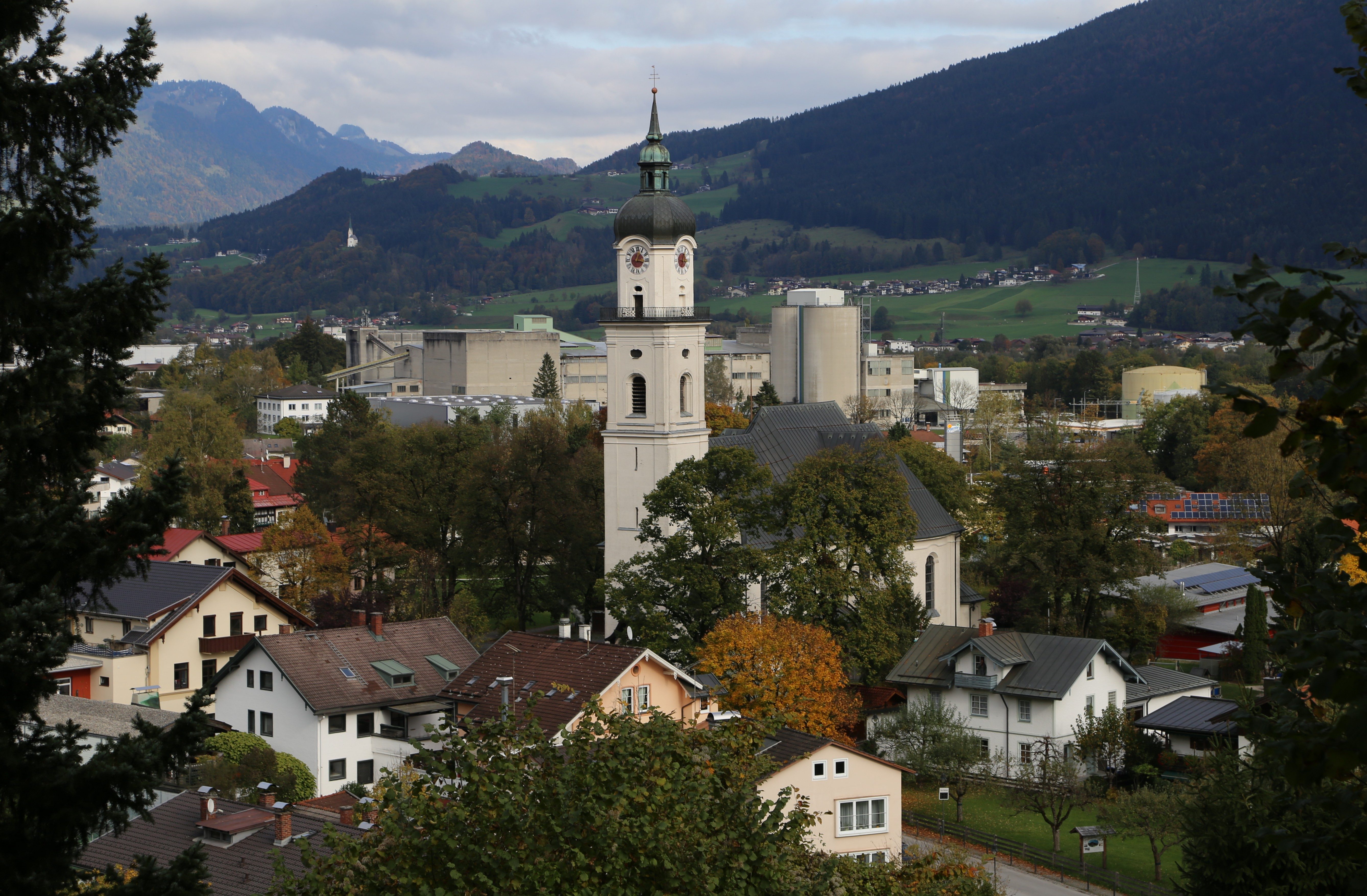 Blick auf Kiefersfelden im Herbst